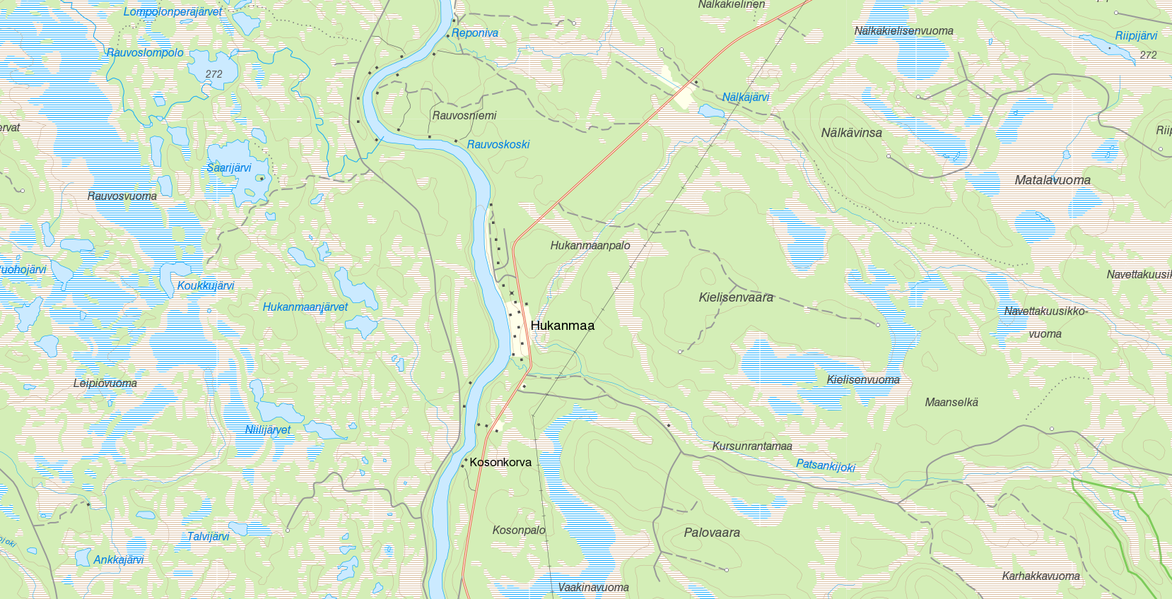 Orten Hukanmaa. Bakgrundskarta från Lantmäteriet, skala 1:30 236.